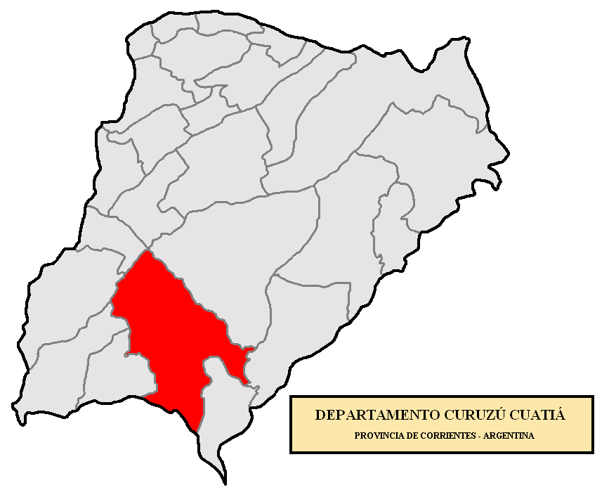 Localización del Departamento Curuzú Cuatiá en la provincia de Corrientes, Argentina Localización del Departamento Curuzú Cuatiá, en la provincia de Corrientes, Argentina.